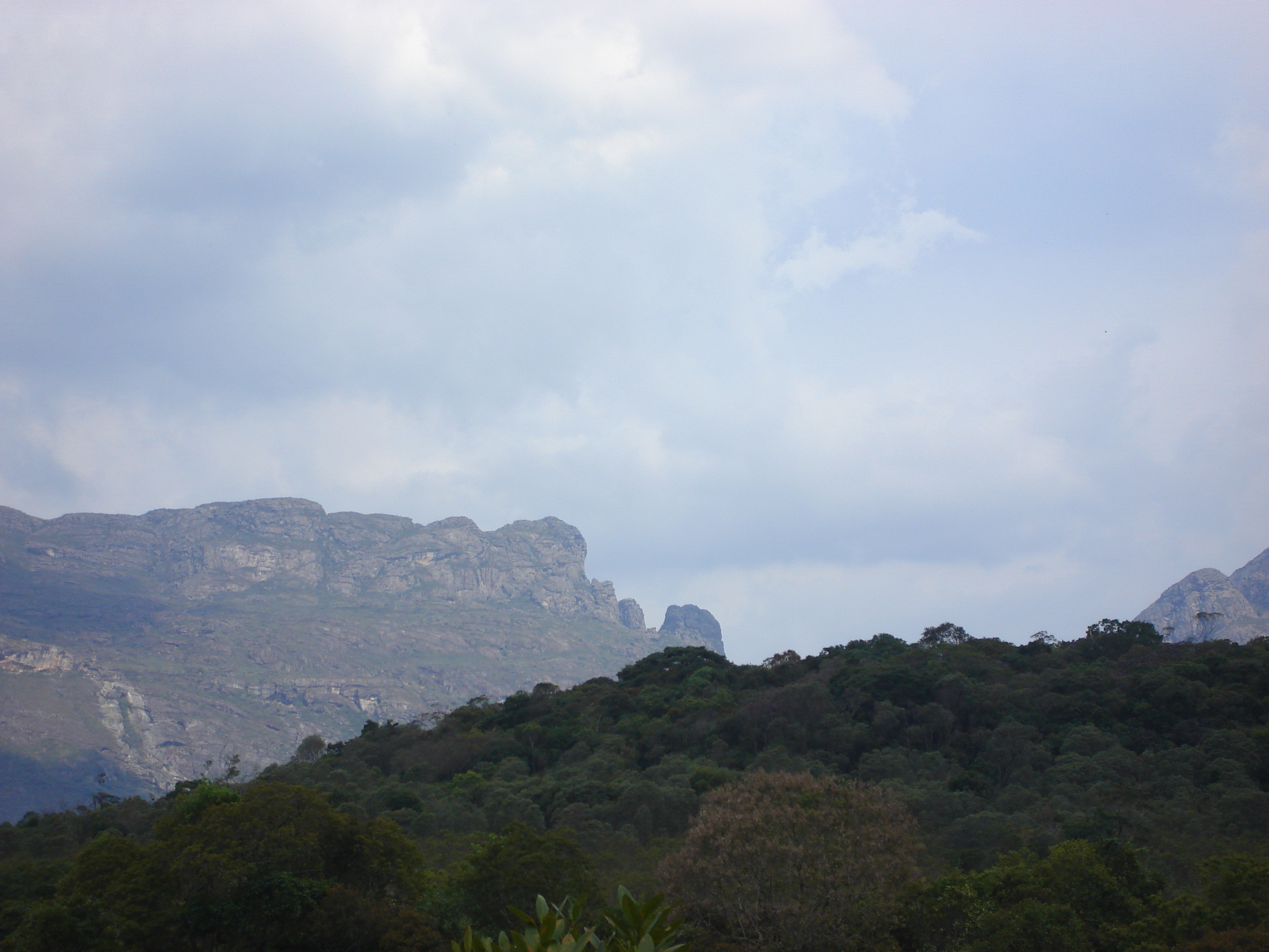 Serra do Caraça